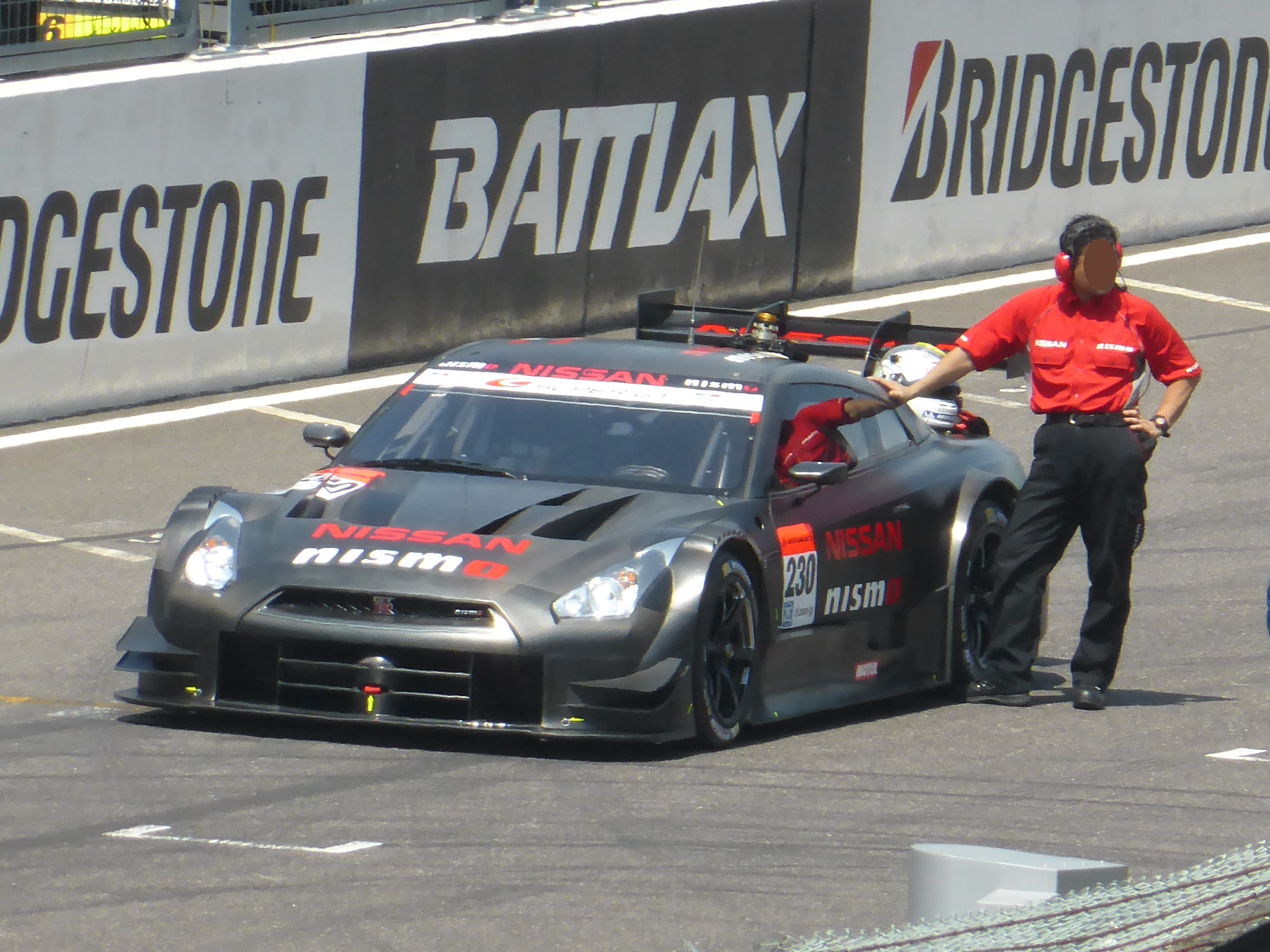 第42回インターナショナルポッカサッポロ1000kmでデモ走行を行う日産・GT-Rの2014年規定GT500車両を撮影。後日みんカラにもアップロード予定